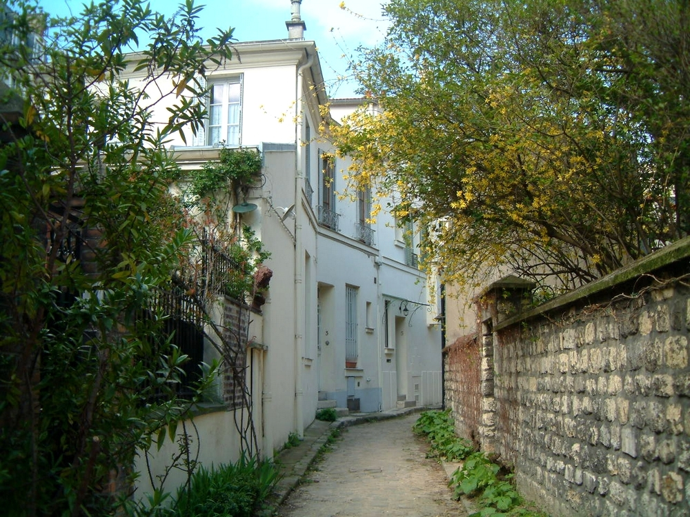 Photo perso de la Villa Hallé, 75014 Paris